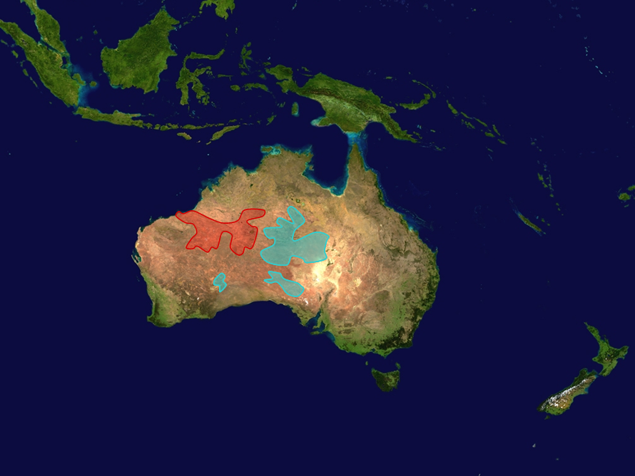 Mapa del área de distribución de Notoryctes sp. Notoryctes caurinus Notoryctes typhlops